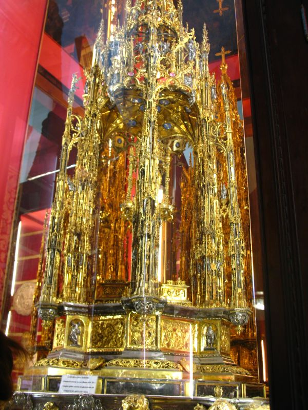 Custodia de la Catedral de Toledo, España